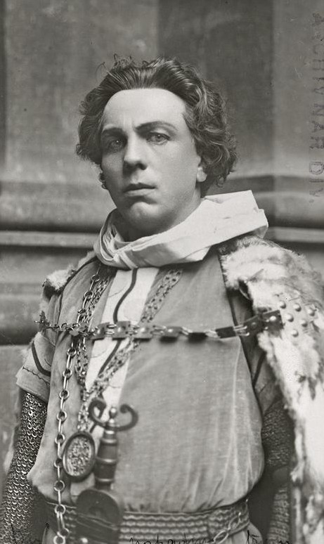 Rudolf Deyl jako Hakon Hakonssön ve hře Nápadníci trůnu (1920)